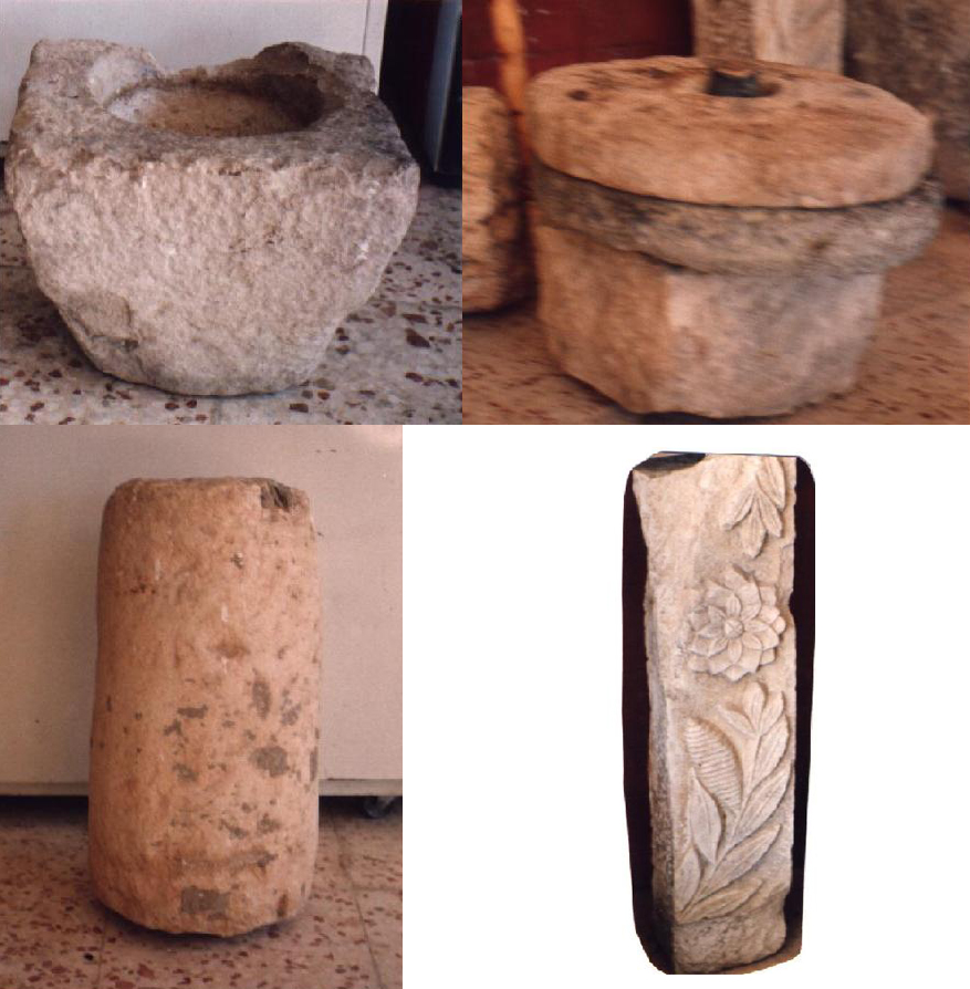 العمدة ، المحدلة ، الجاروشة والجرن - أدوات قديمة كانت تستعملفي بلدة عبا - جنوب لبنان